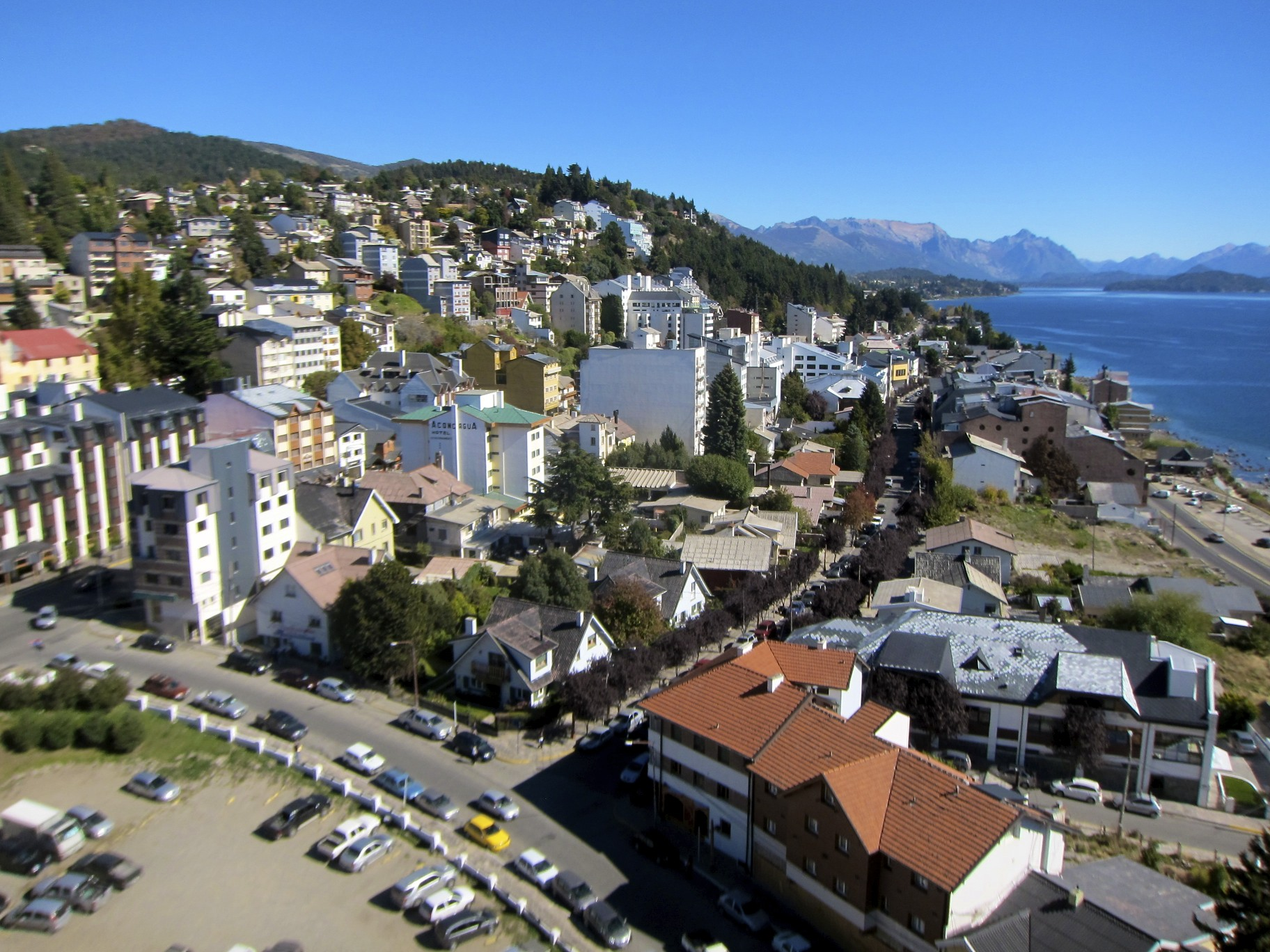 Vista hacia el oeste desde el balcón de un hotel.